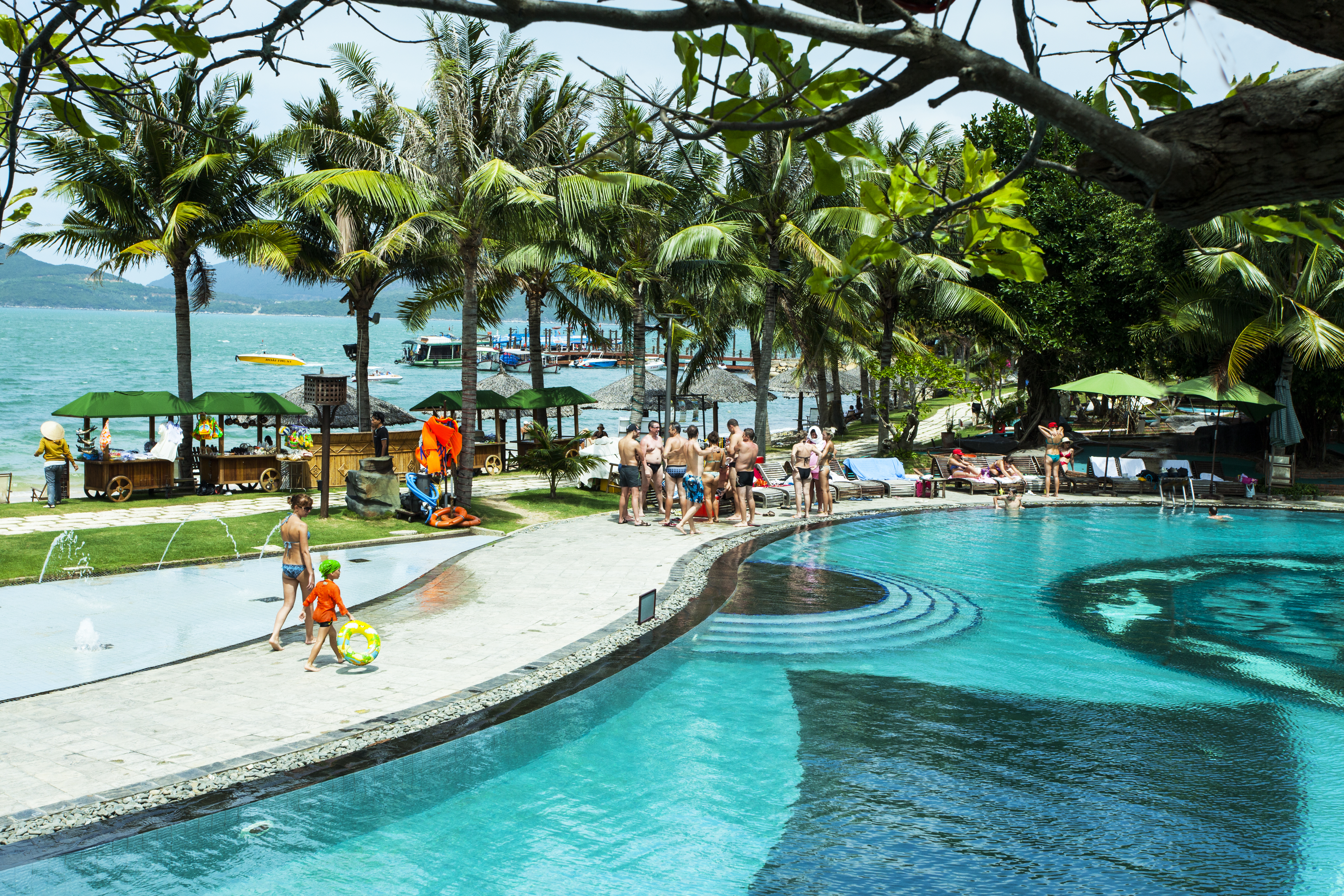 Hòn Tằm Resort - Khu nghỉ dưỡng cao cấp trên đảo.